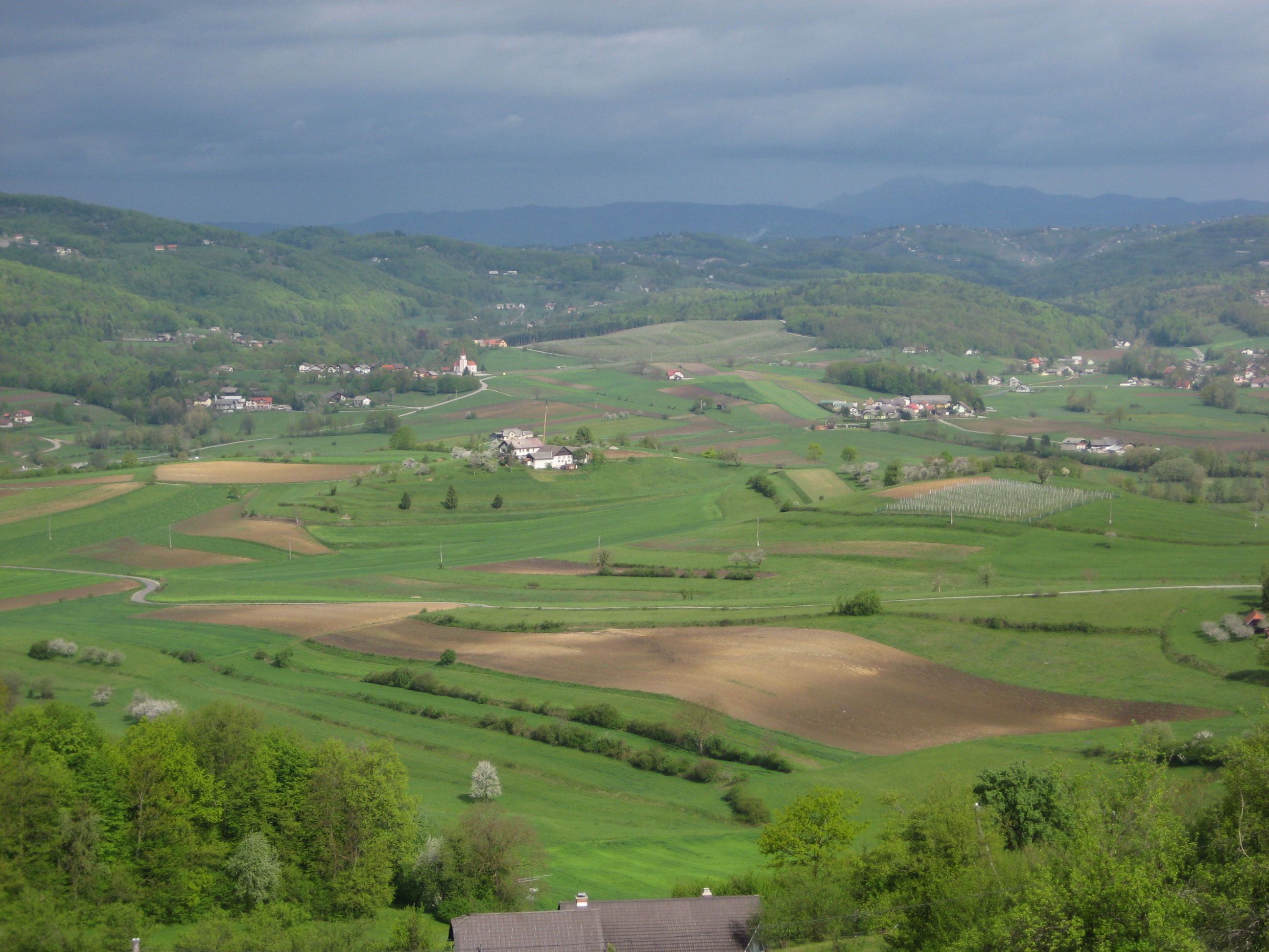 Pokrajina in polja, Šmarješke Toplice